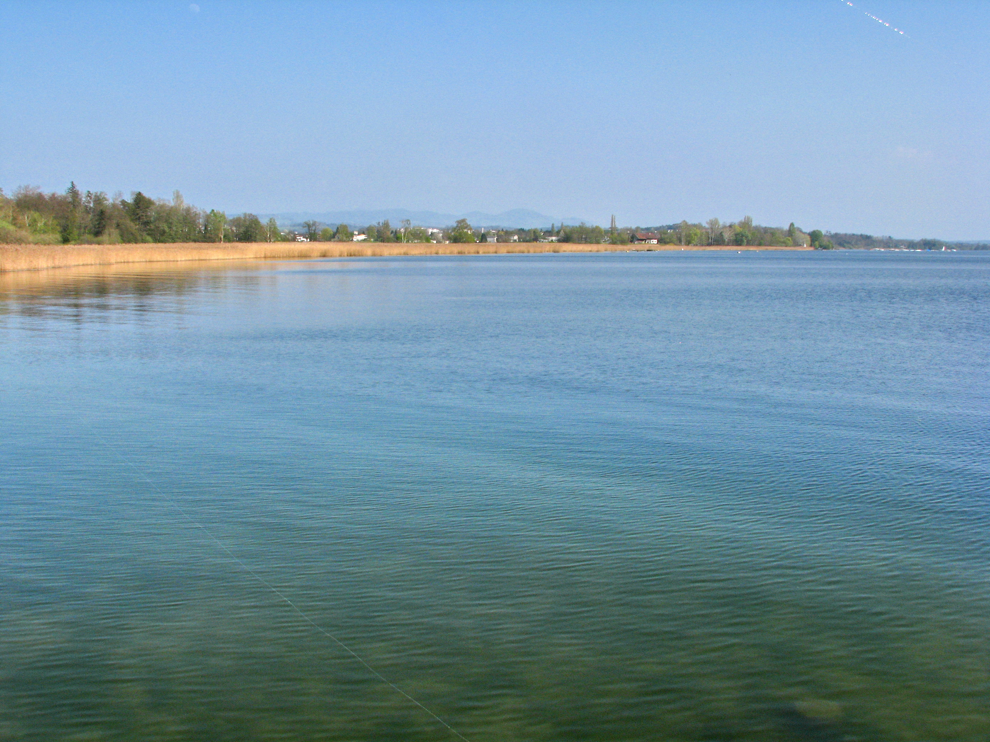 Greifensee (Lake Greifen) as seen from Glatt effluence in Schwerzenbach